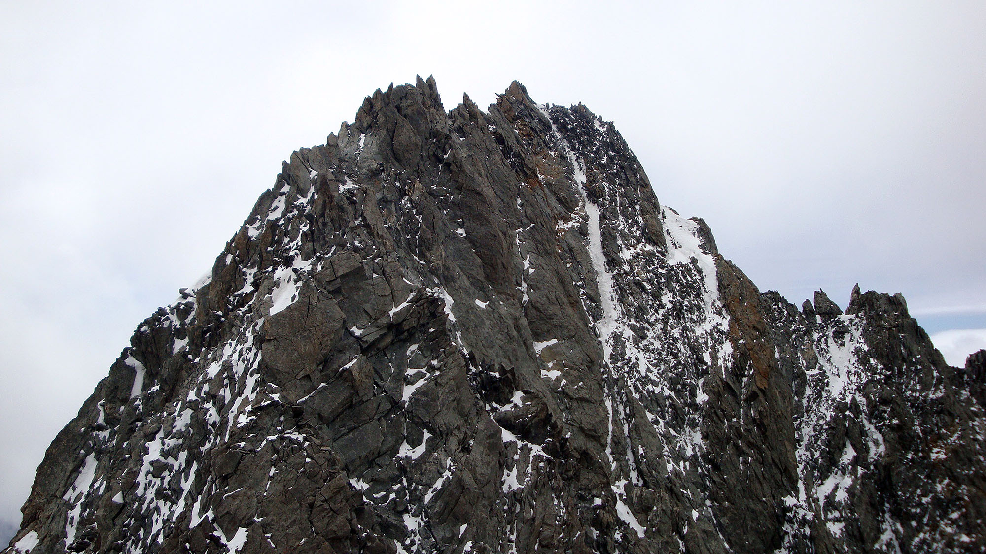 Il Monte Brouillard visto dal Colle Rey - Massiccio del Monte Bianco - Versante Italiano